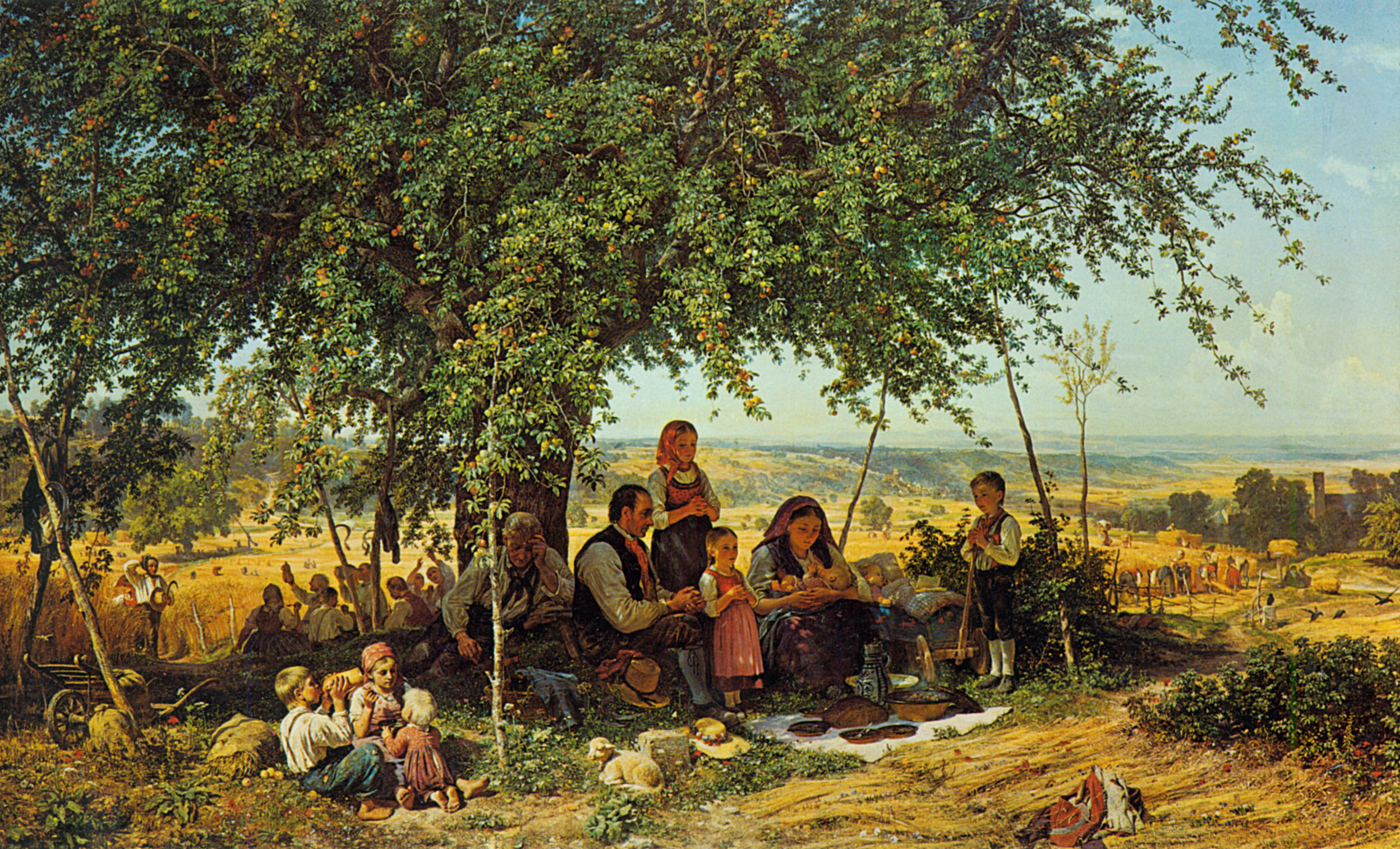 Mittagsrast bei der Ernte